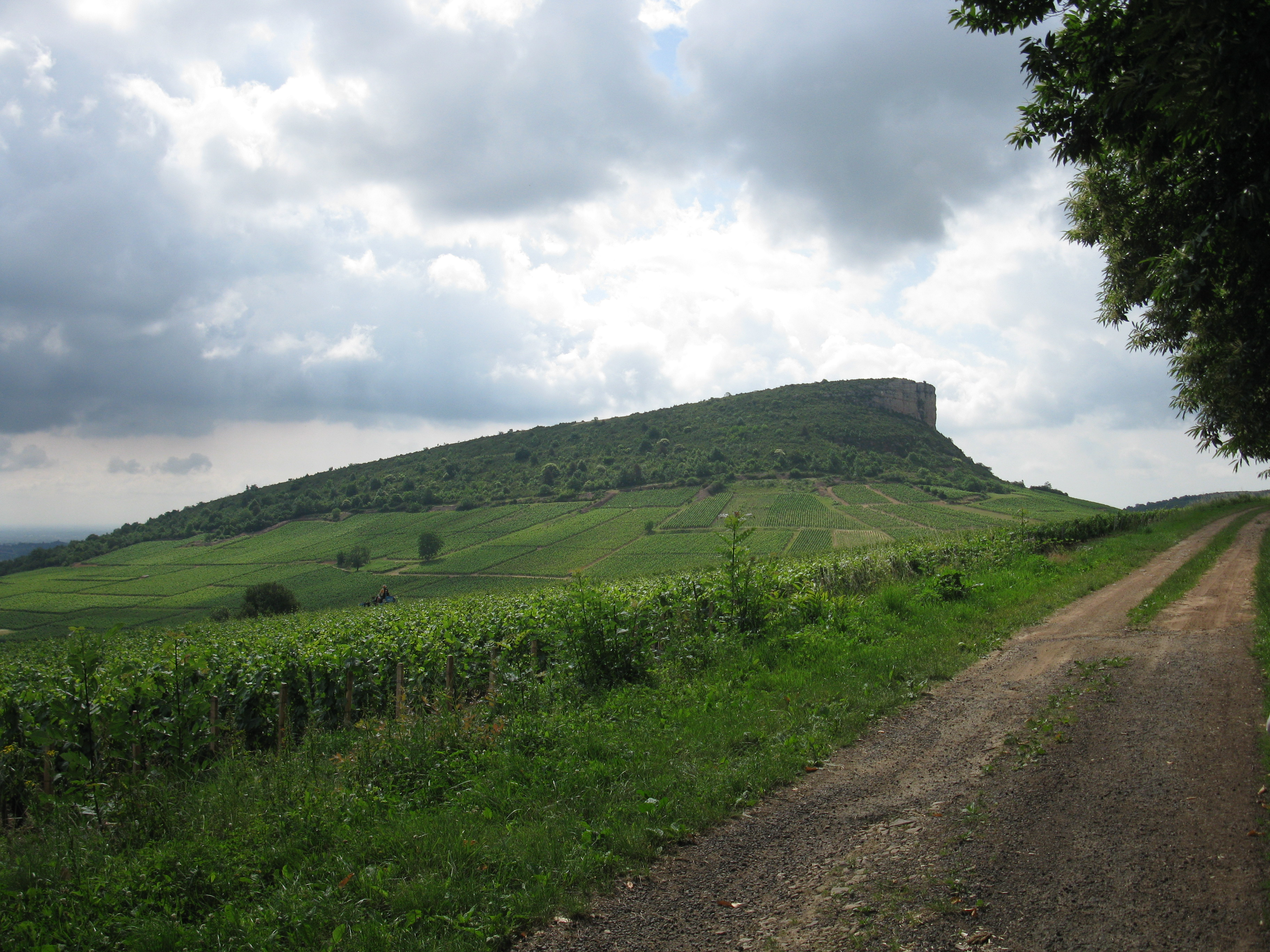 Roche de Vergisson